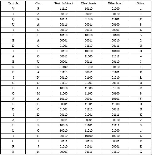 missateg xifrat